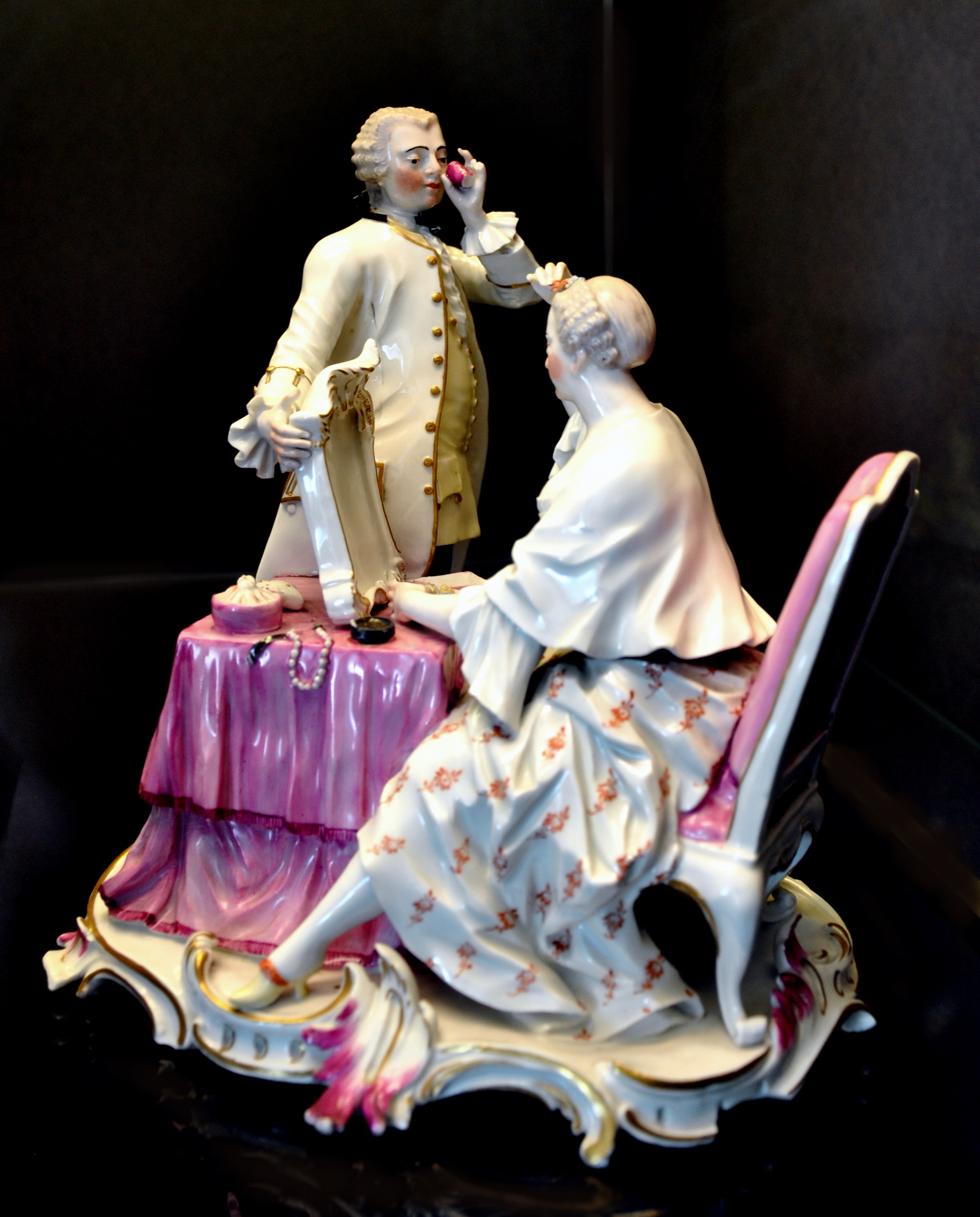 Porzellangruppe "Das Gesicht" (Sehsinn: Fernglas, Spiegel), Frankenthal, um 1760, Modelleur: Johann Friedrich Lück (1727–1797) Ausstellung "Das stille Örtchen – Tabu und Reinlichkeit bey Hofe" der Staatlichen Schlösser und Gärten Baden-Württemberg, Bad Schussenried